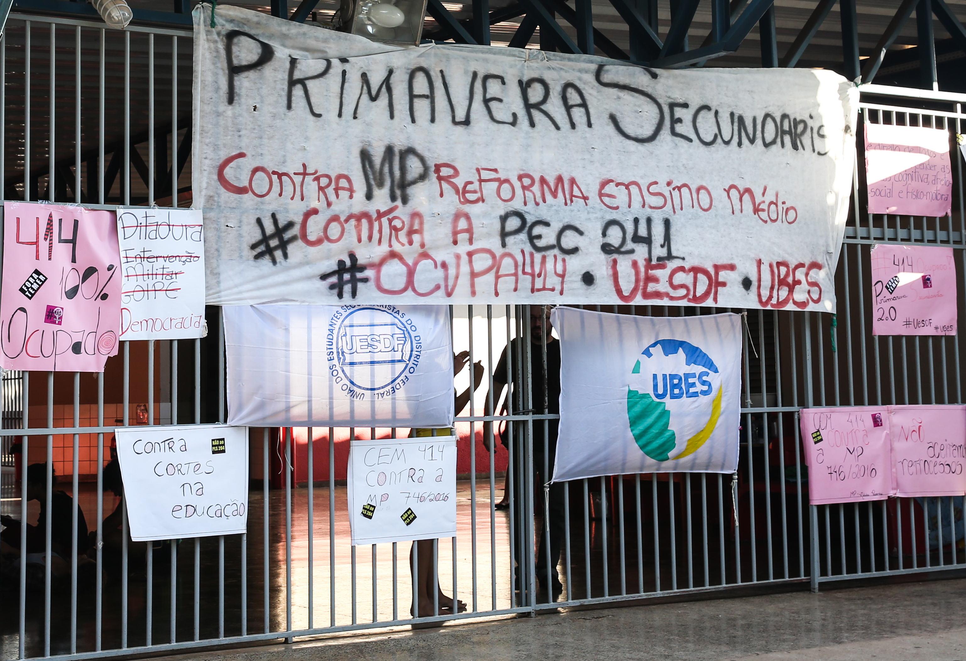 Brasília - Alunos ocupam Colégio de Samambaia em ato contra a reforma do ensino médio, a escola tem 1,7 mil alunos e a aula foi cancelada (Wilson Dias/Agência Brasil)